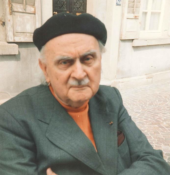 Deitsch: Franz Büchler 1988